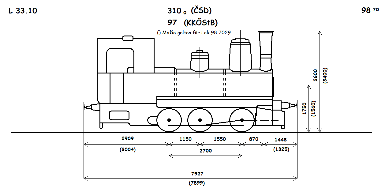 Schéma s rozměry lokomotivy řady 97 kkStB. Vytvořeno v programu malování dle výkresové dokumentace z publikace Železnice v Sudetech : 1938-1945, ISBN 80-903346-0-1. (Kniha je dostupná ve Studijní a vědecké knihovně v Hradci Králové.) Na požádání mohu poskytnou plnou verzi souboru ve formátu BMP 2.23 MB.